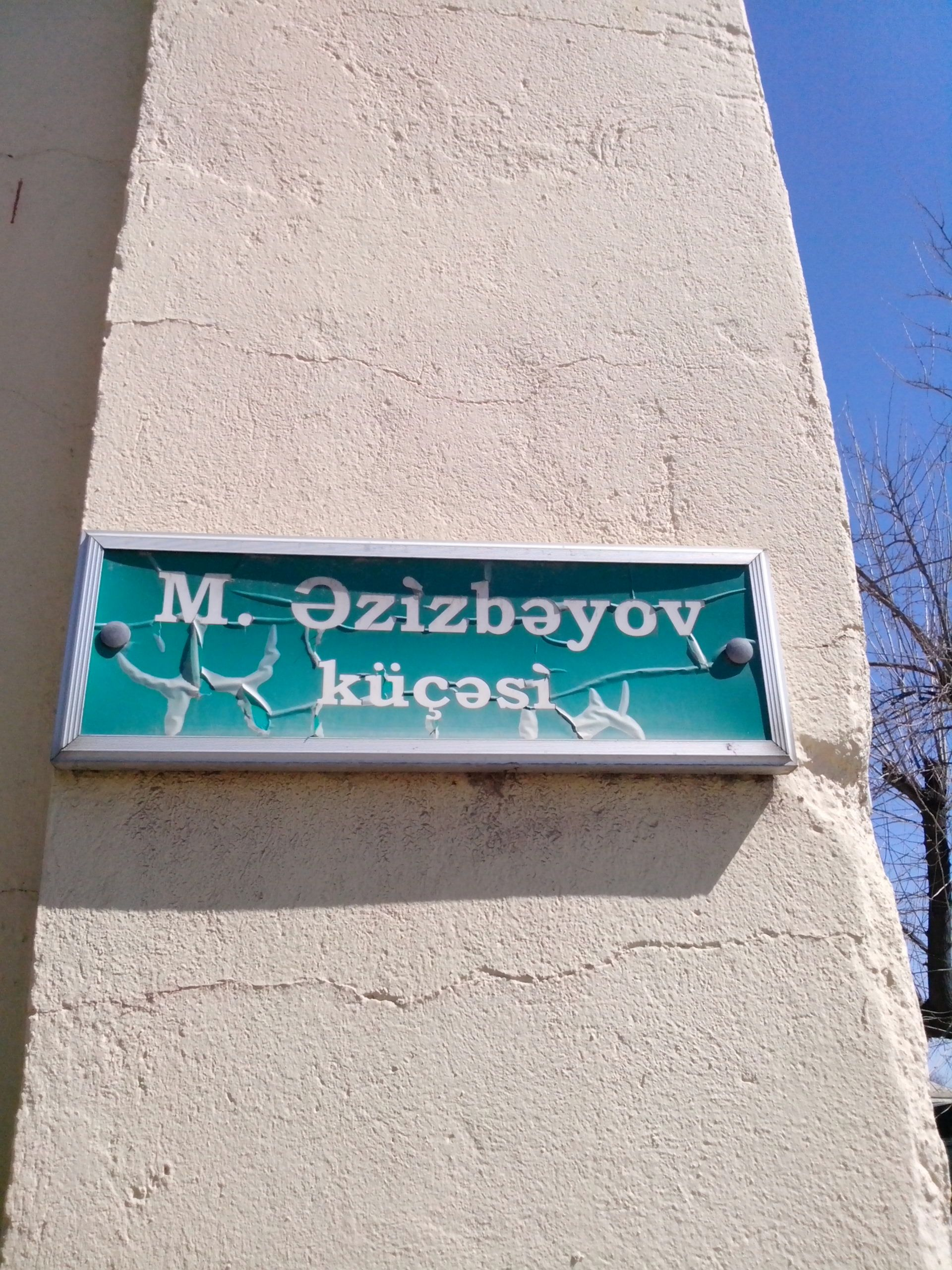 Quba şəhərindəki M. Əzizbəyov küçəsi